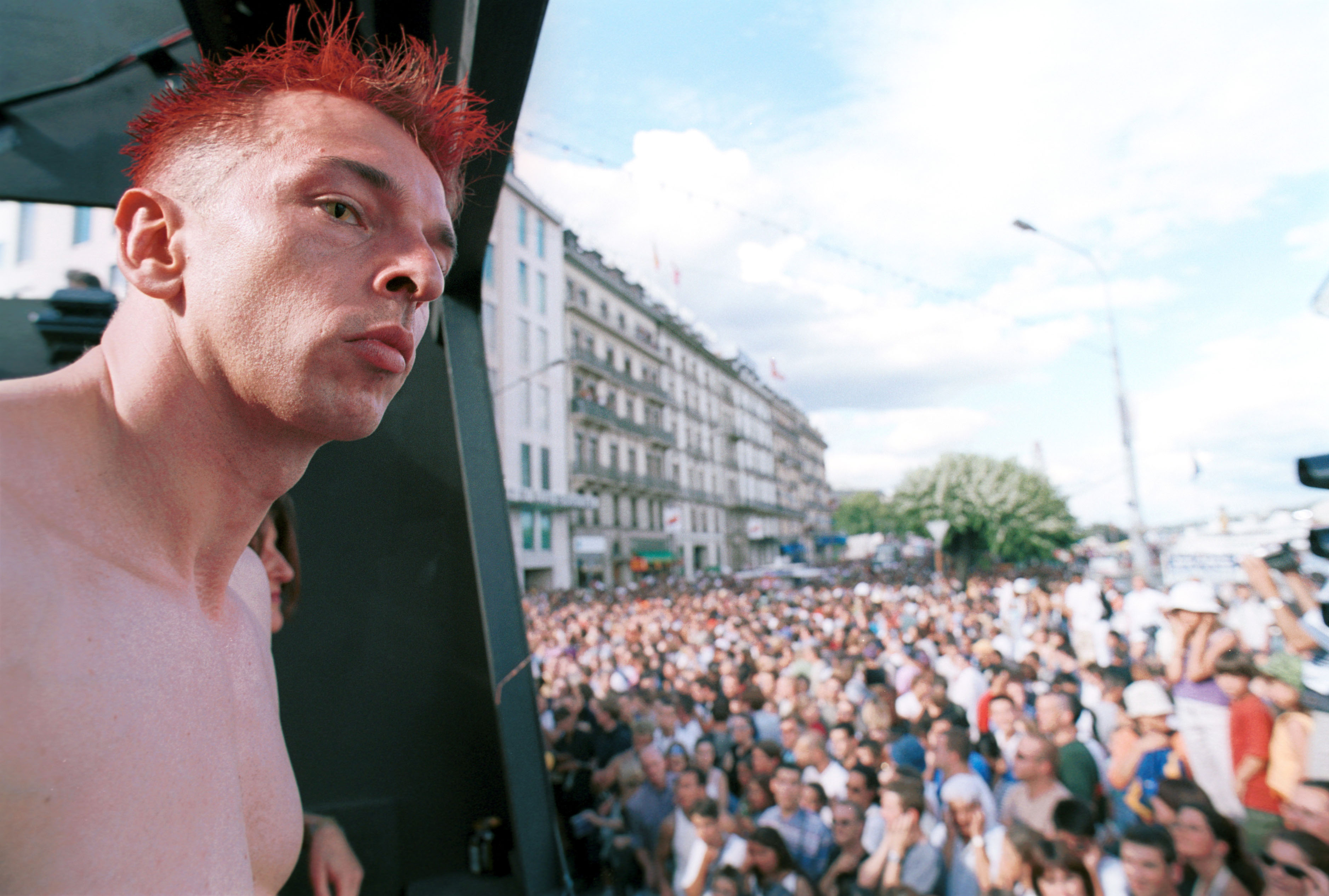 Lake Parade sur la rade de Genève en août 2001.